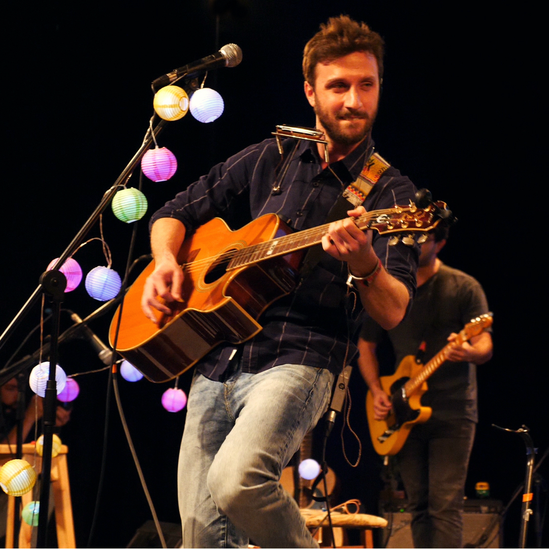 אורי רונן מנגן בהופעת ההשקה של האלבום בתל אביב